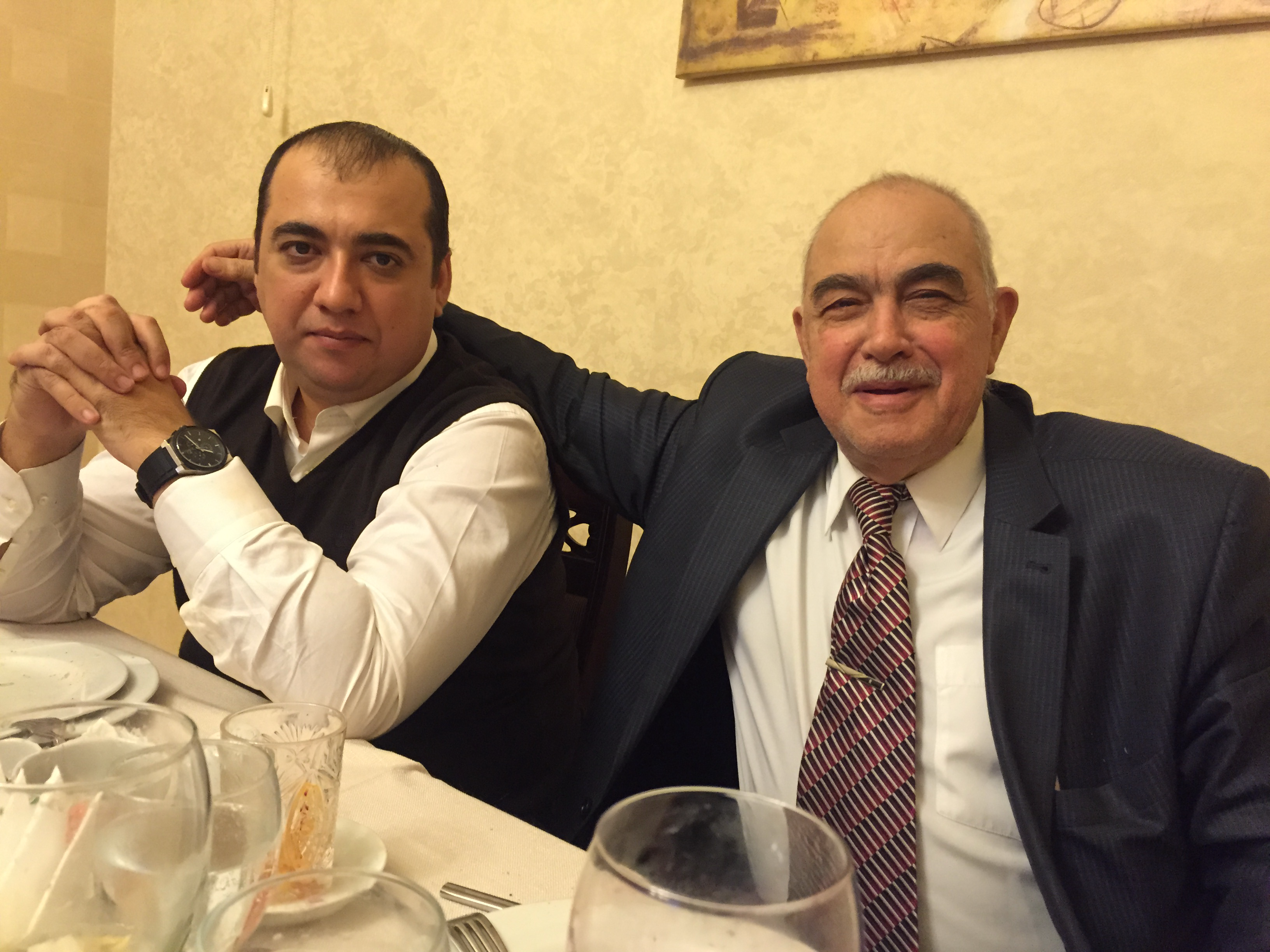 professor Yolçuyev Allahyar Bəxtiyar oğlu